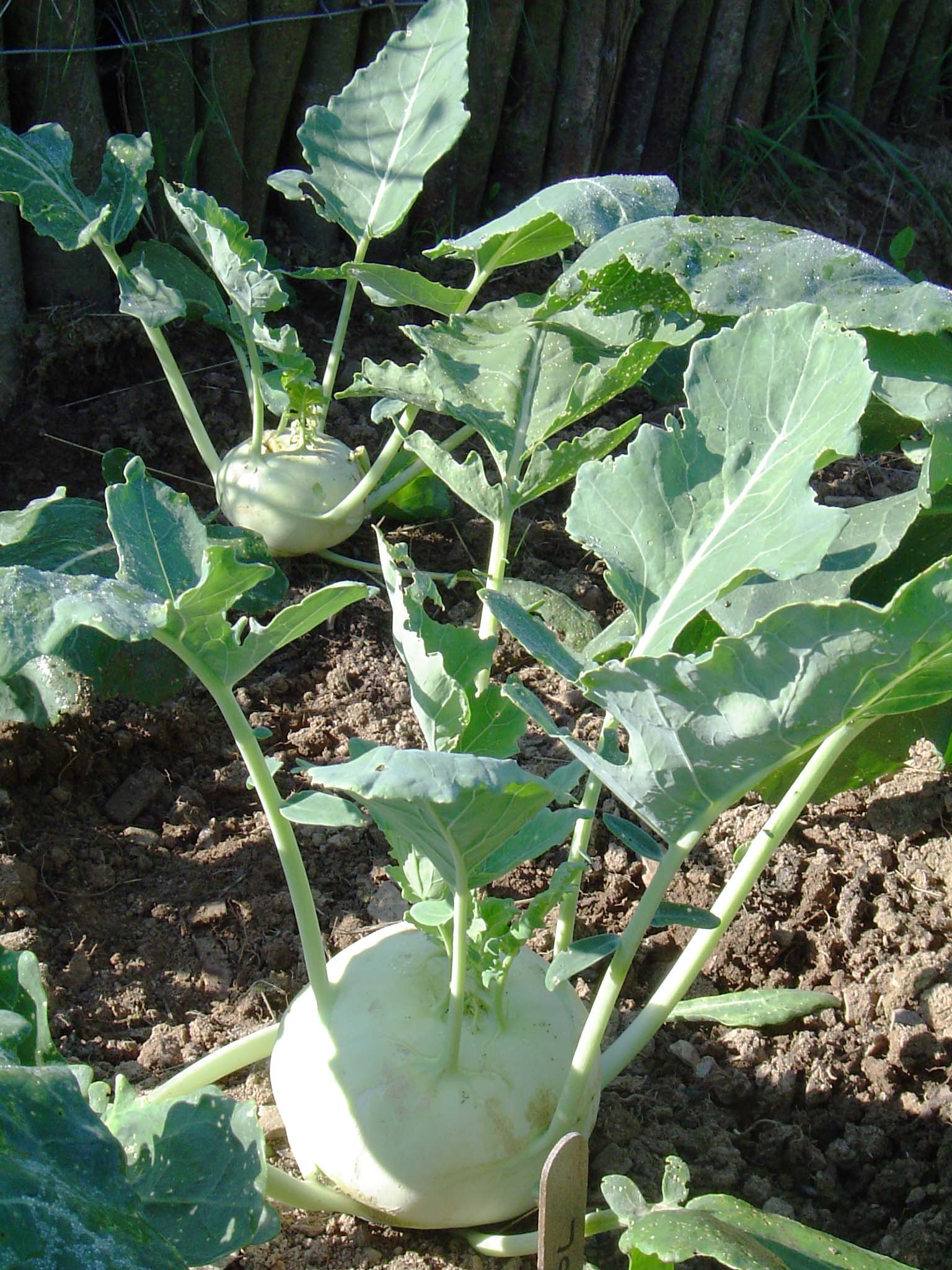 koolrabi eigen foto